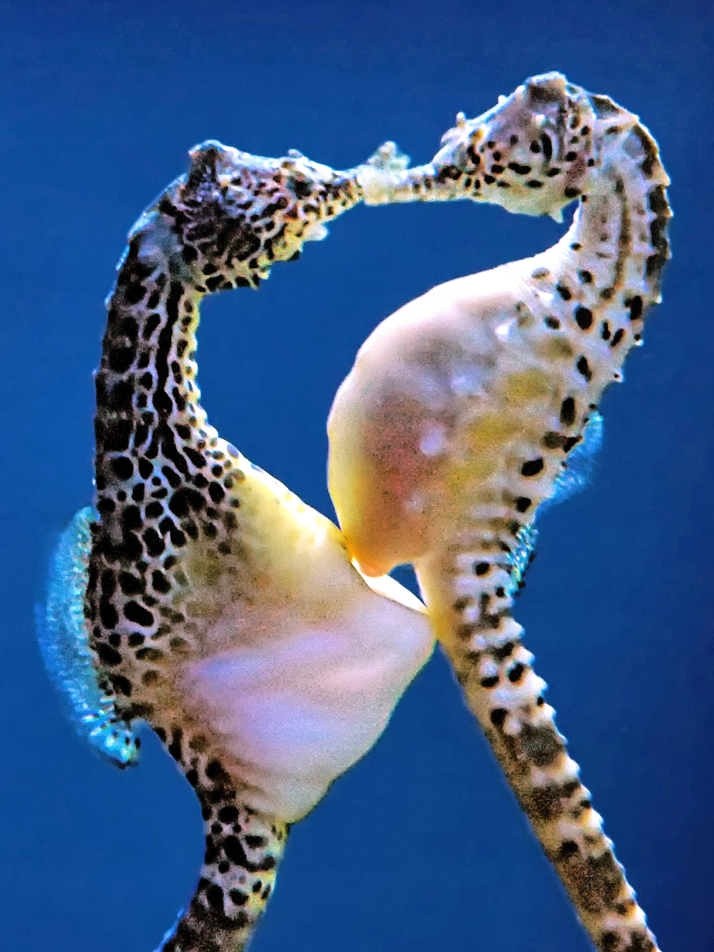 Hippocampus abdominalis, apareamiento. Monterey Bay Aquarium, California, Estados unidos